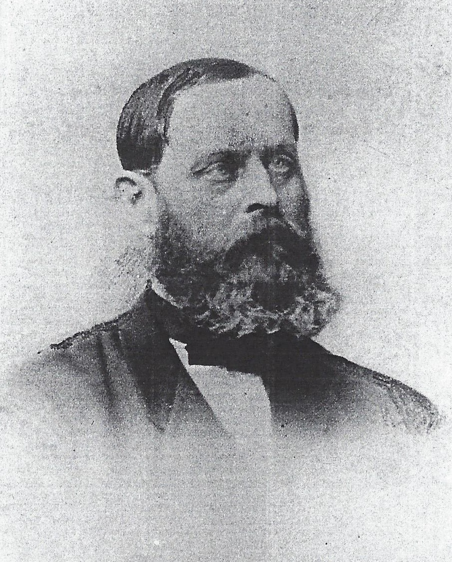 Porträtfotografie von Friedrich Bernhard von Hagke (1822-1874)